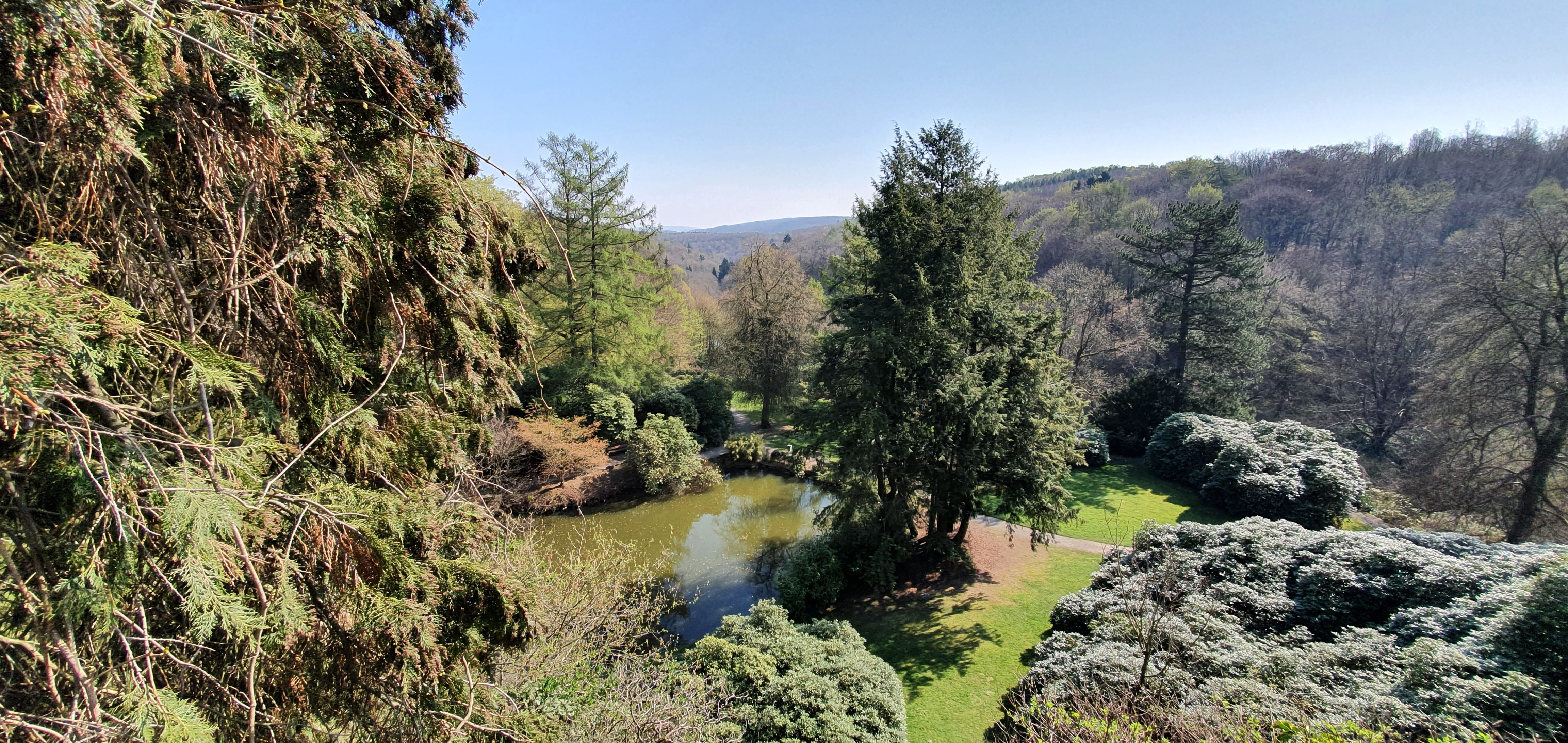 Wunderbarer Vorwerk Park